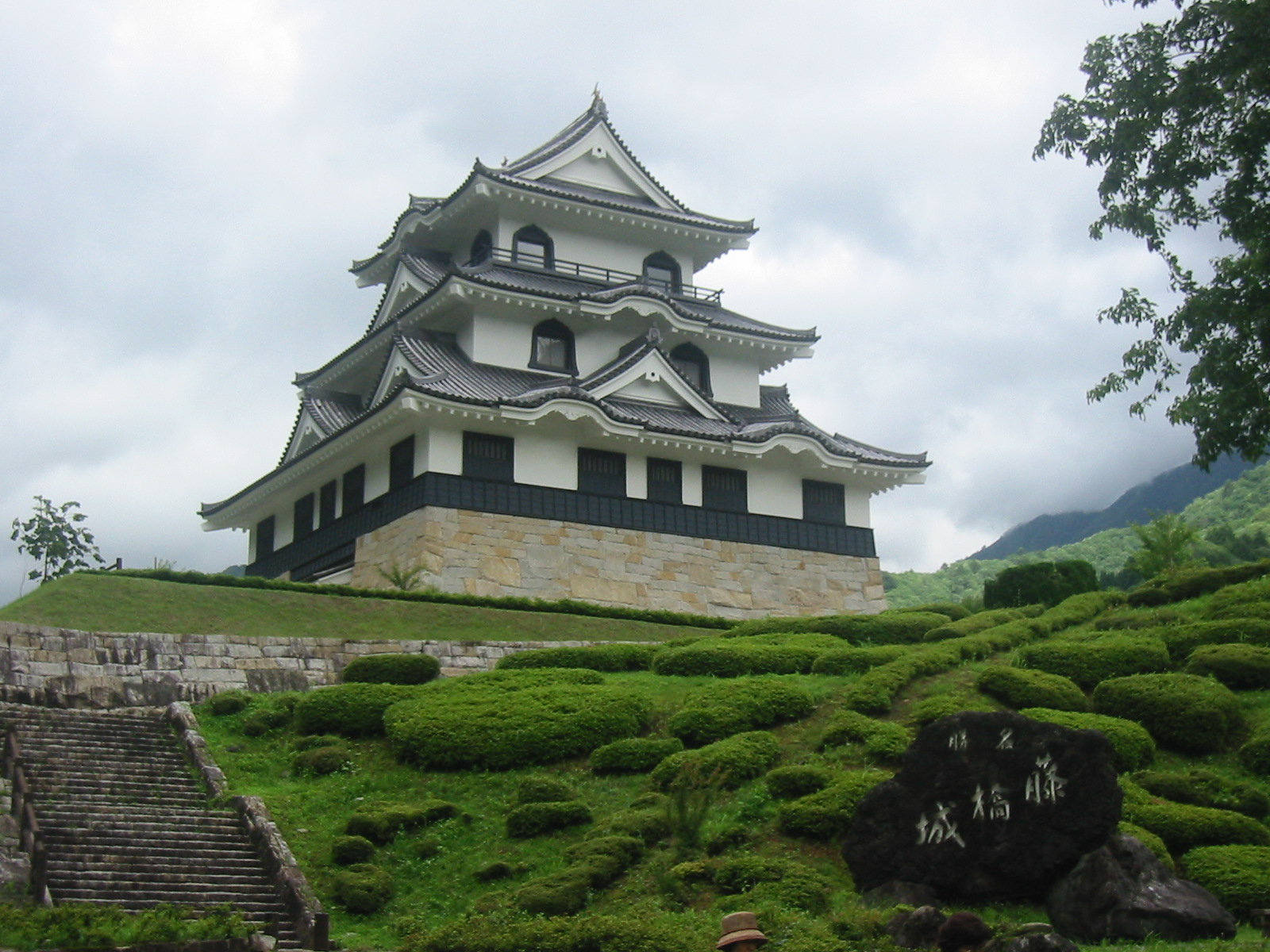 Fujihashi-joh(藤橋城),Ibigawa,Gifu,Japan(岐阜県揖斐川町)で撮影